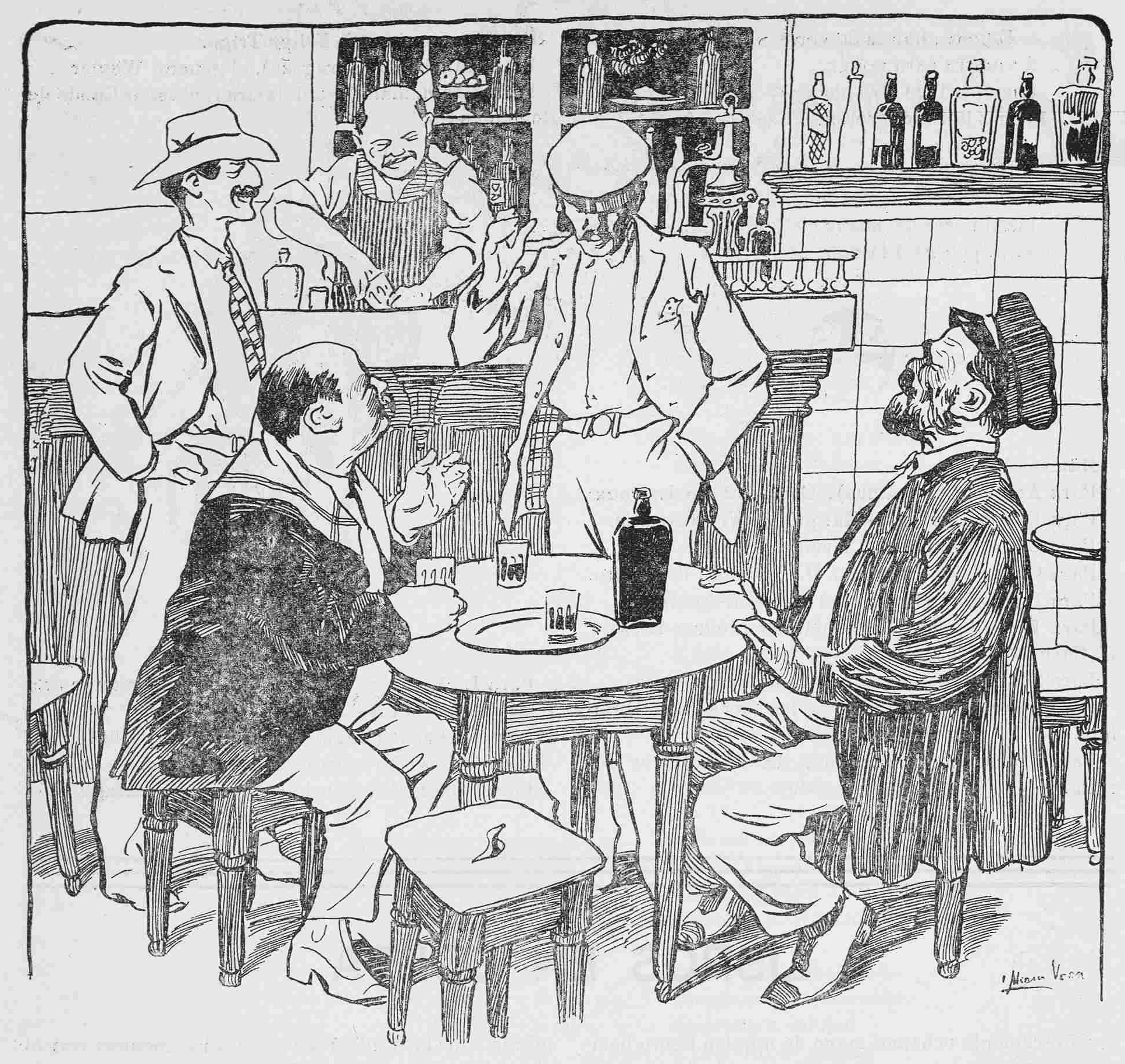 Los proyectos pendientes.